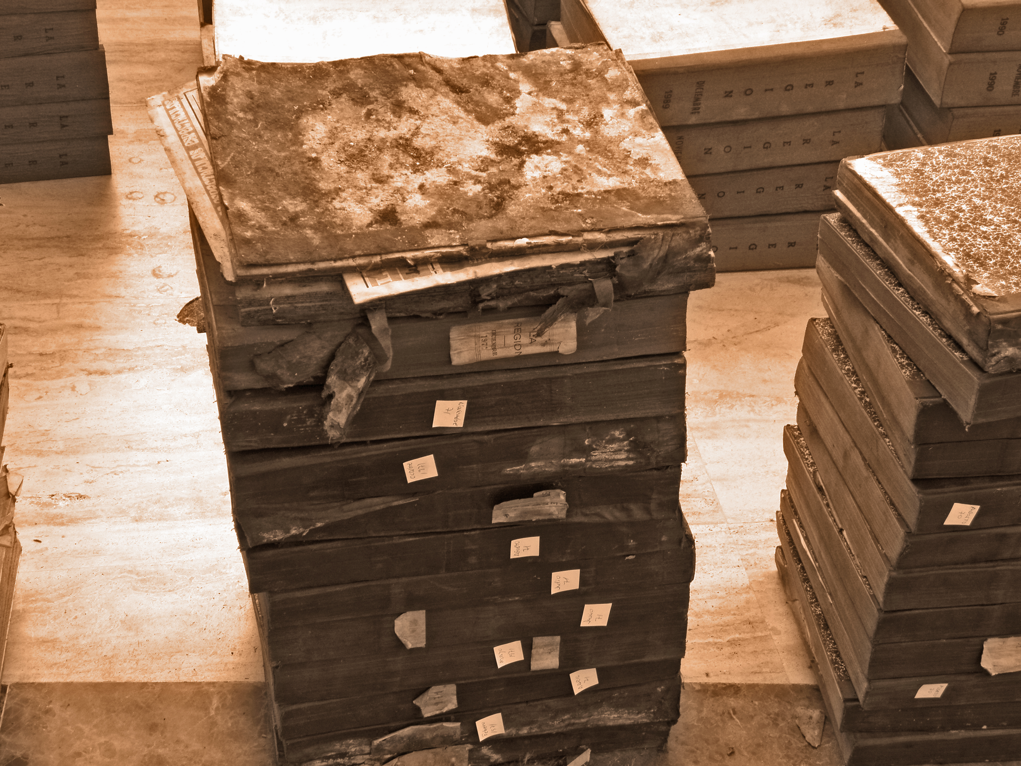 Cidade da Cultura